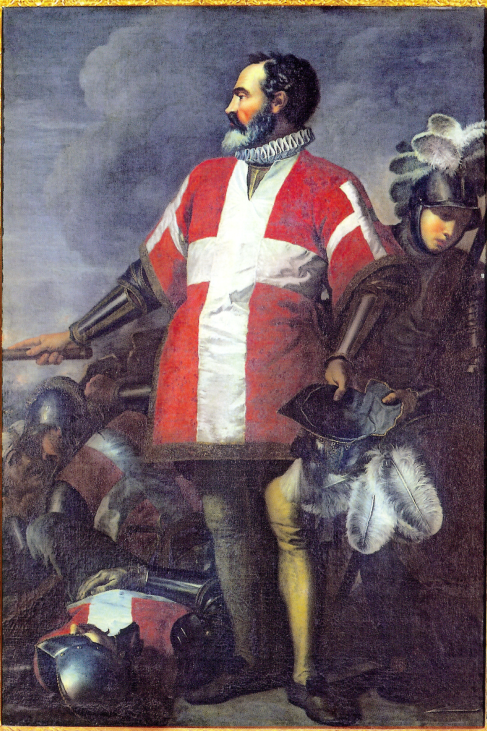 grand maître Jean de Valette par Antoine Favray - Palais des grands maîtres - La Vallette - Malte